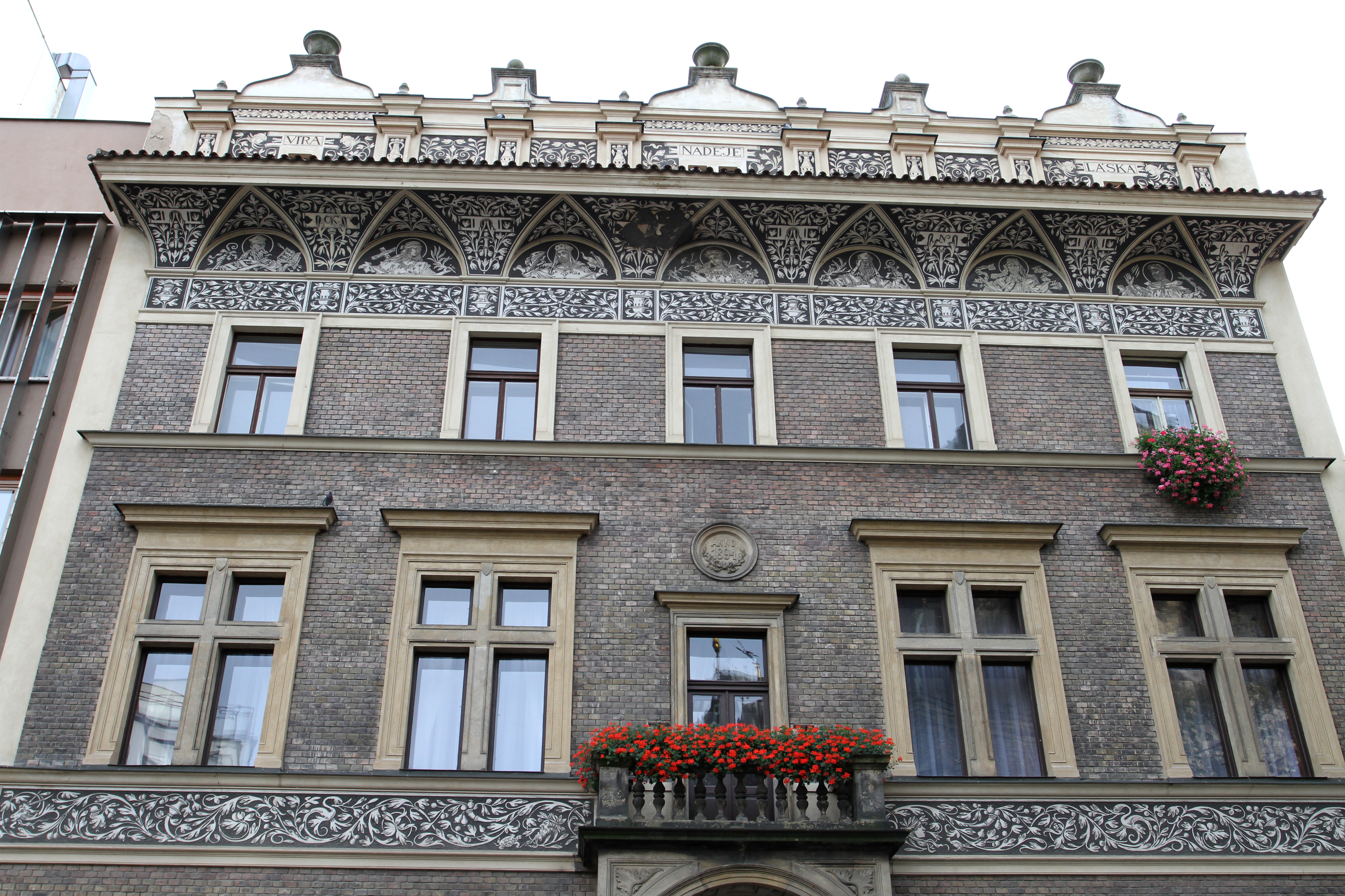 Fara (Nové Město), Praha 1, Biskupská 1137/13, Nové Město